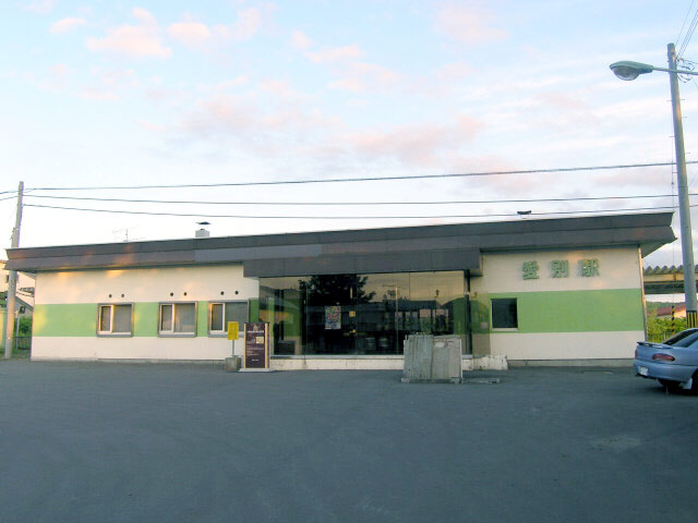 愛別駅外観 撮影場所 愛別駅駅前広場 撮影者によるGFDLリリース